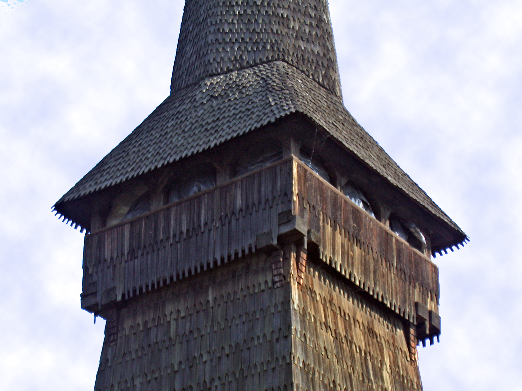 Romania, Bucarest, chiesa in legno dalla Transilvania, nel "Village Museum", particolare della torre.